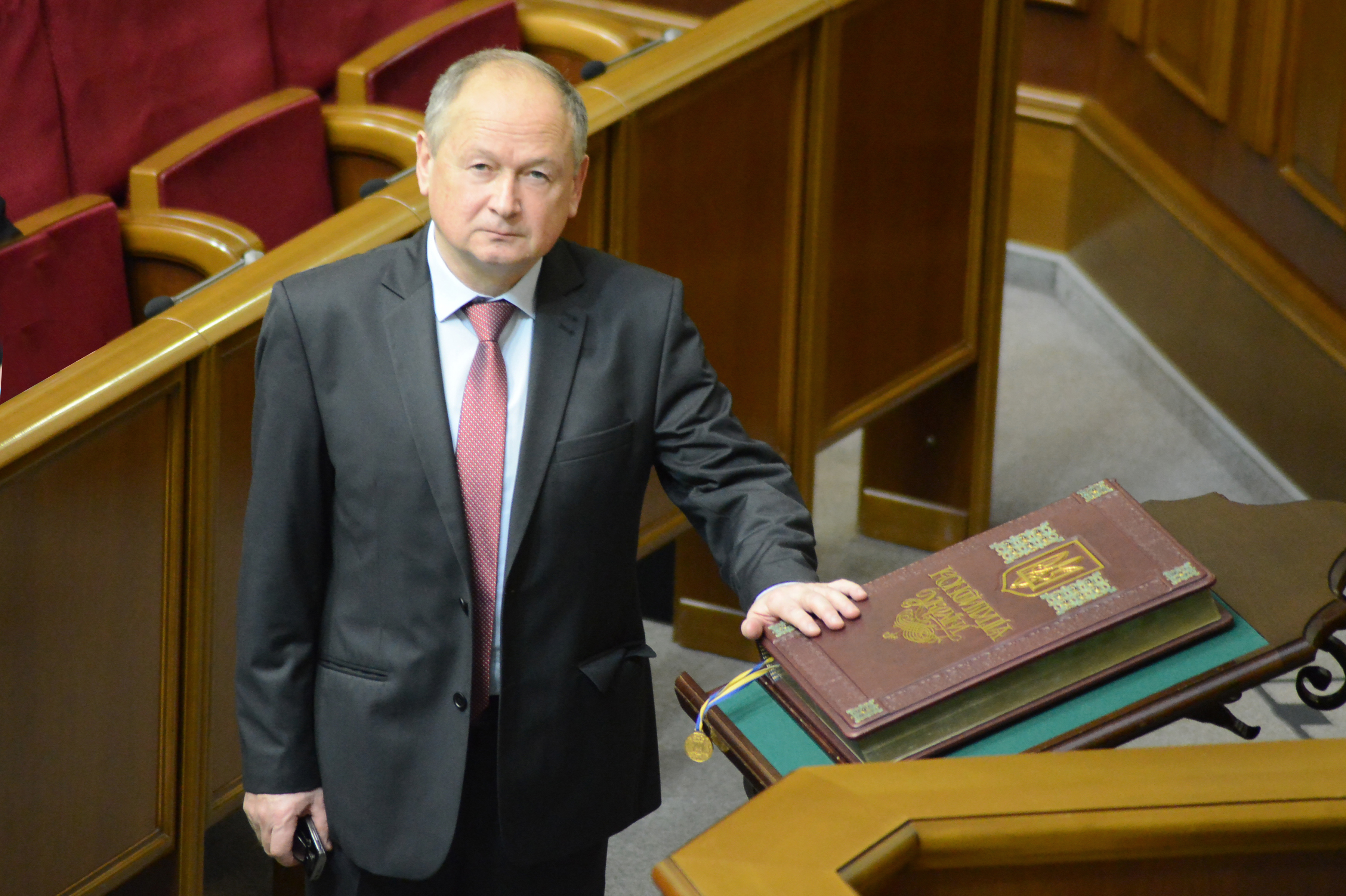 ВЕРХОВНА РАДА УКРАЇНИ 2015 фотограф Вадим Чуприна